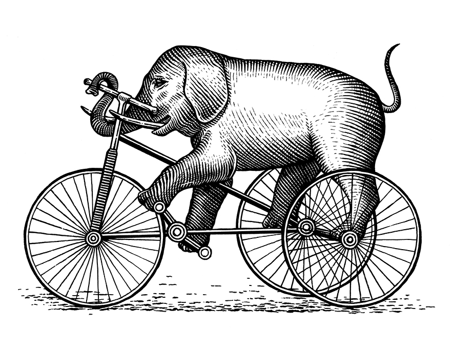 Orosdi-Back logotyp